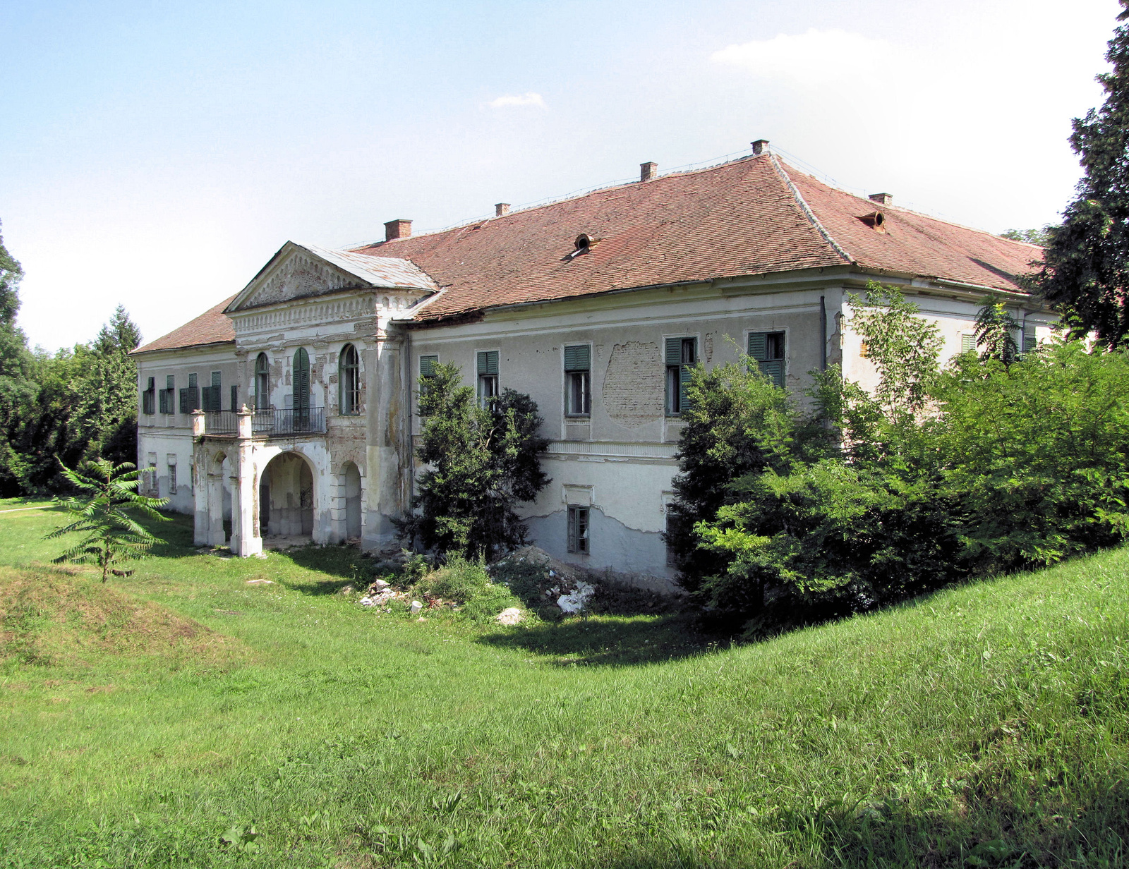 Volt Zichy-kastély (Nágocs, Ady Endre u. 15 .) This is a photo of a monument in Hungary, Identifier: 8033